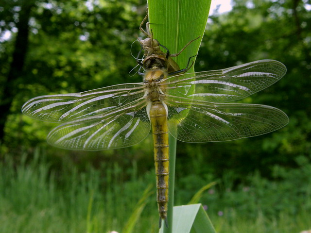 la Cordulie à deux taches Epitheca bimaculata (Charpentier, 1825), femelle à l'émergence, Ain, France